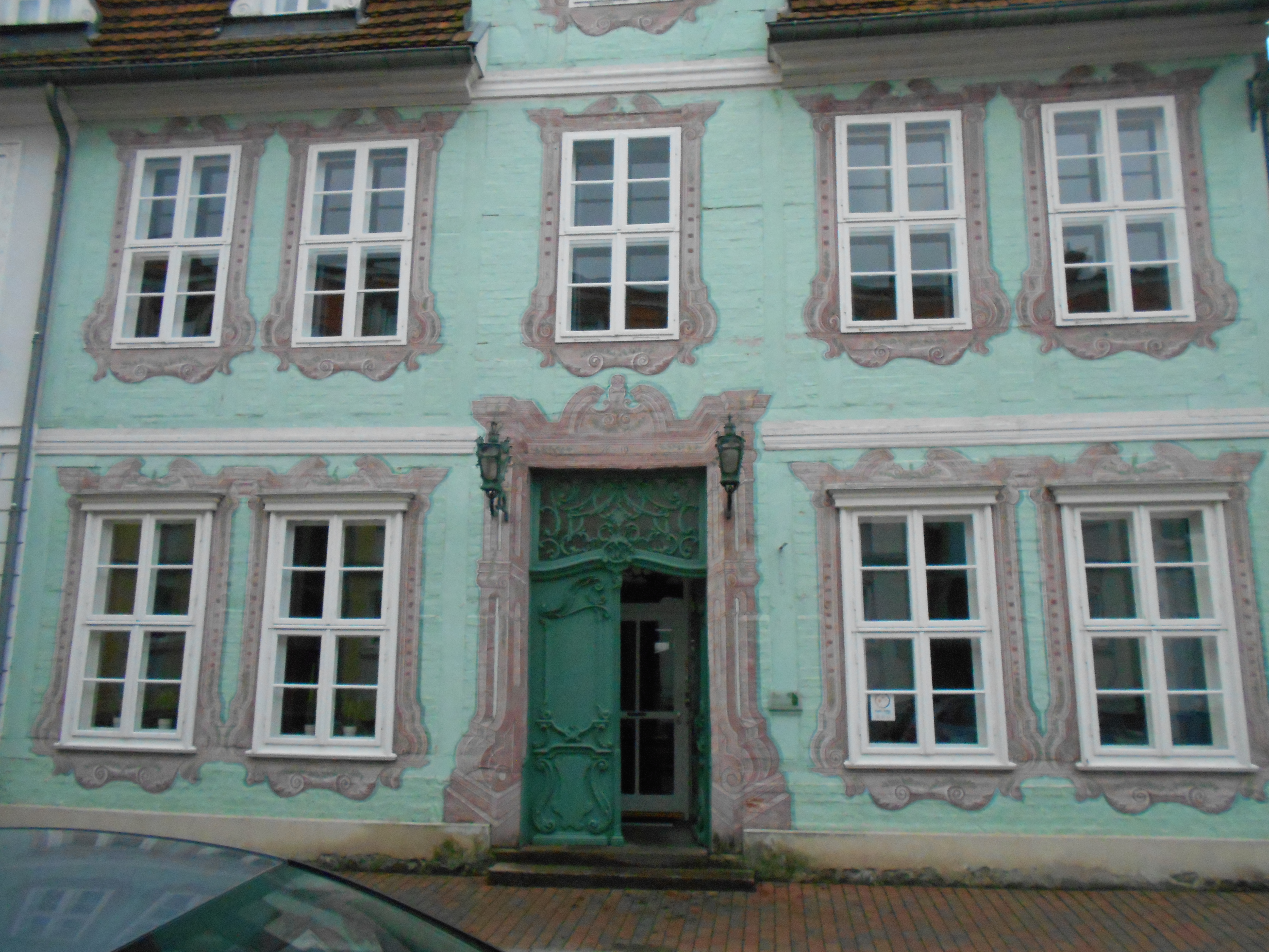 Fassade des Hauses der Kirche Güstrow